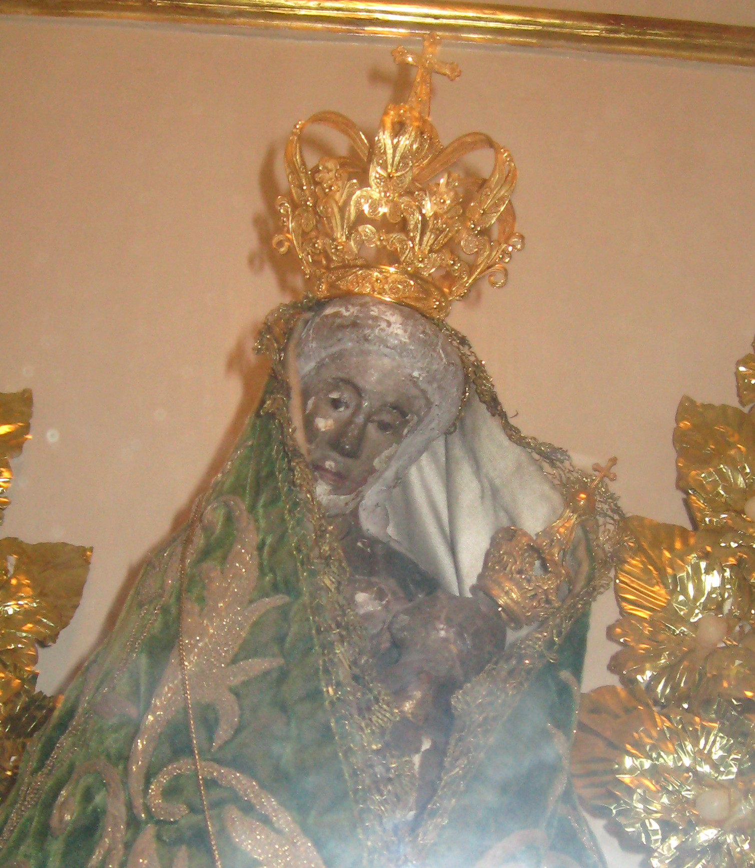 Nazaré, Portugal, Sítio, Sculpture: Nossa Senhora de Nazaré, face, over 800 years old, public domain, in: Igreja da Nossa Senhora da Nazaré; no photo-restriction at 2008-05-20